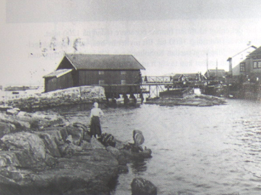 Den gamla bron mellan Koholmen och Klädesholmen på 1800-talet. Foto efter gammalt vykort.